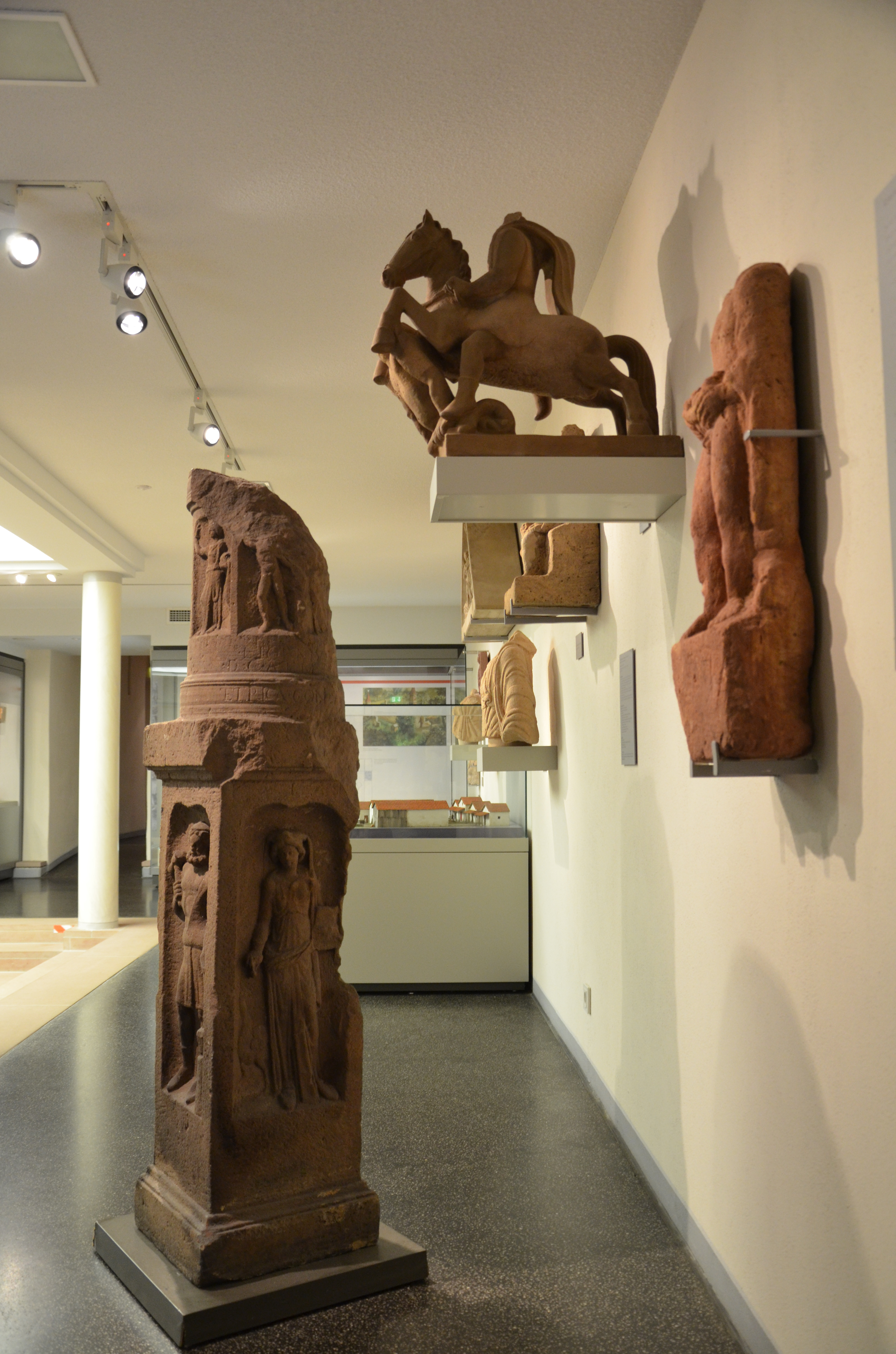 Museum Schloss Fechenbach, Dieburg, Germany